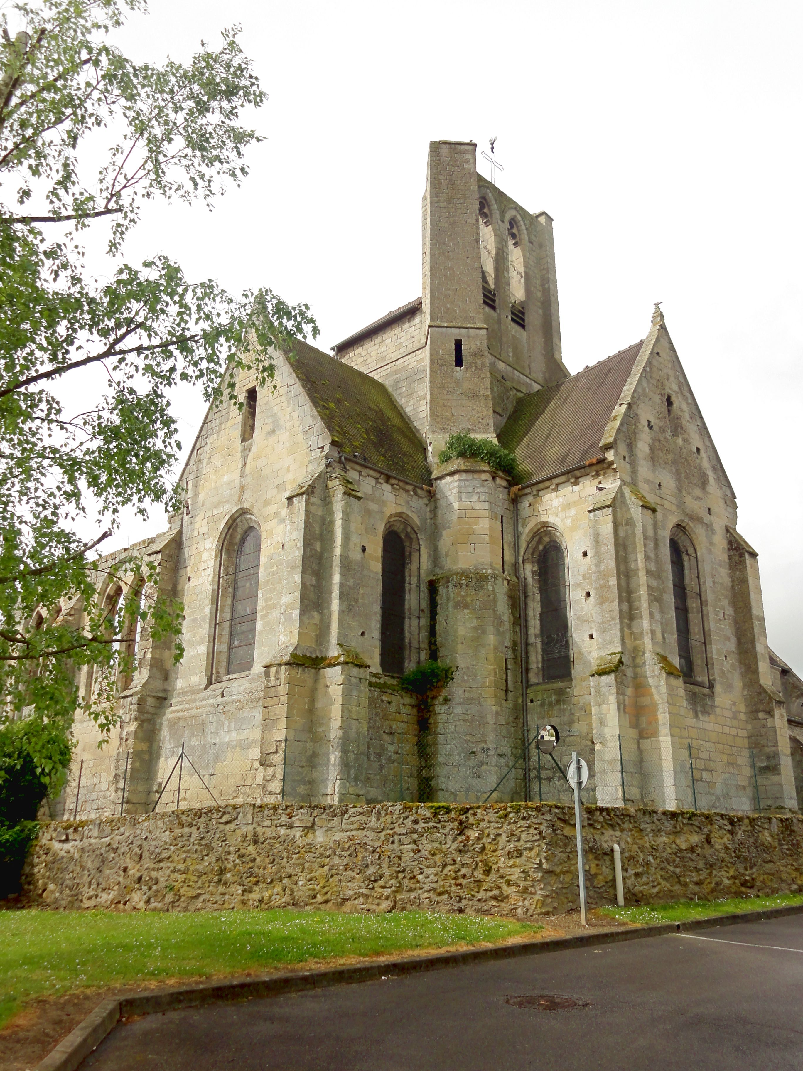 Vue depuis le nord-est.